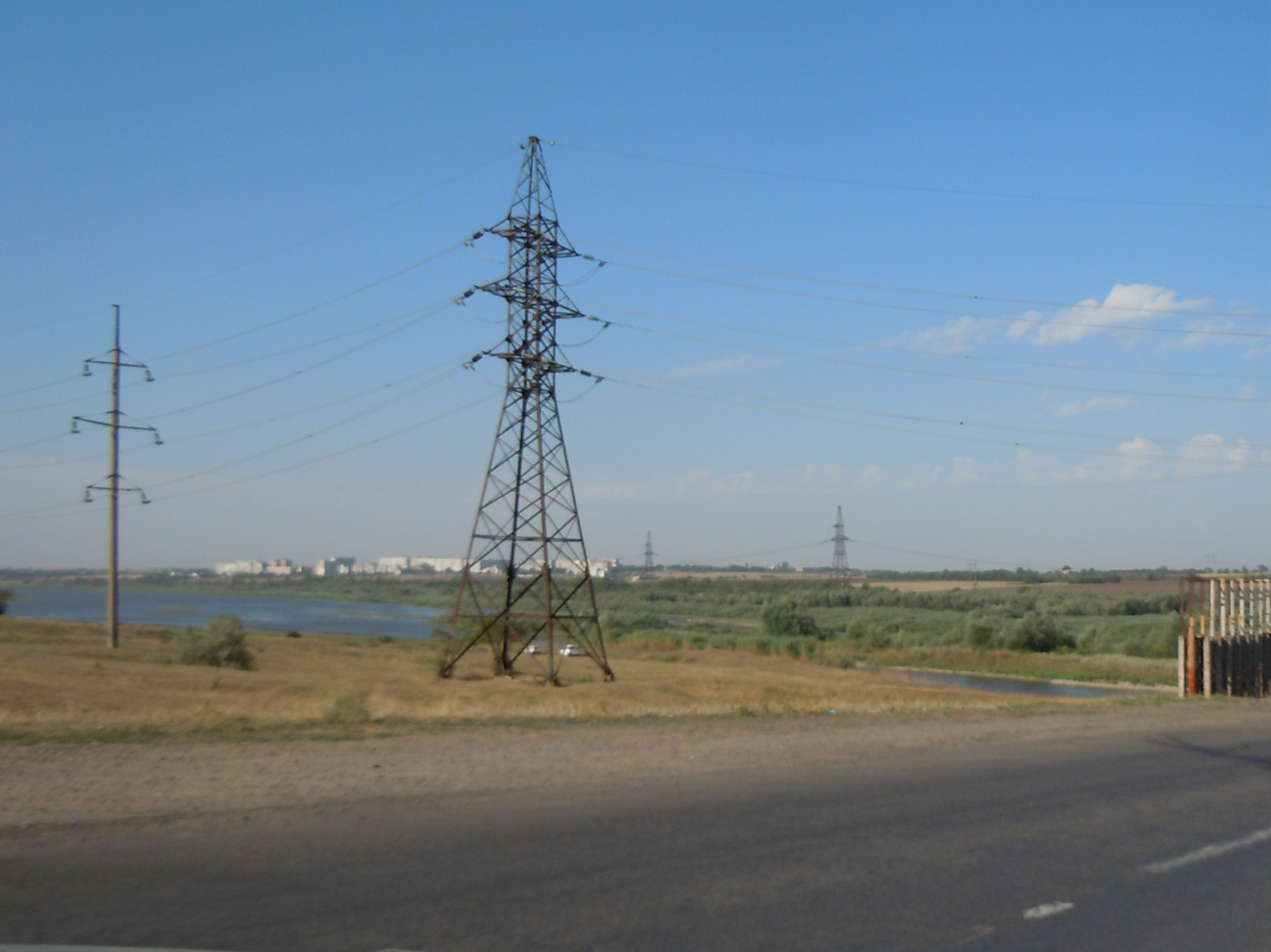 Місто Теплодар видно на протилежному березі Барабойського водосховища